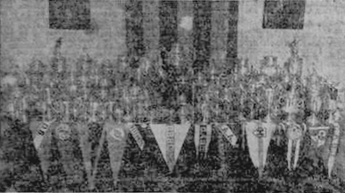 Sala de trofeos de Unión 1925